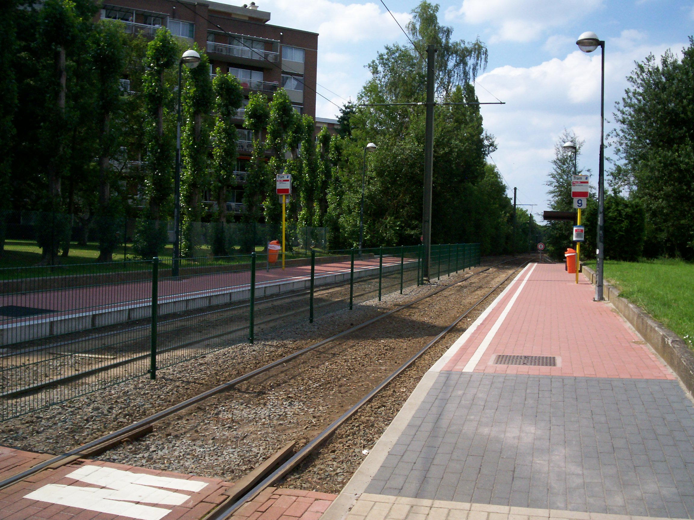 Le terminus oriental de la ligne 39 : Ban Eik.